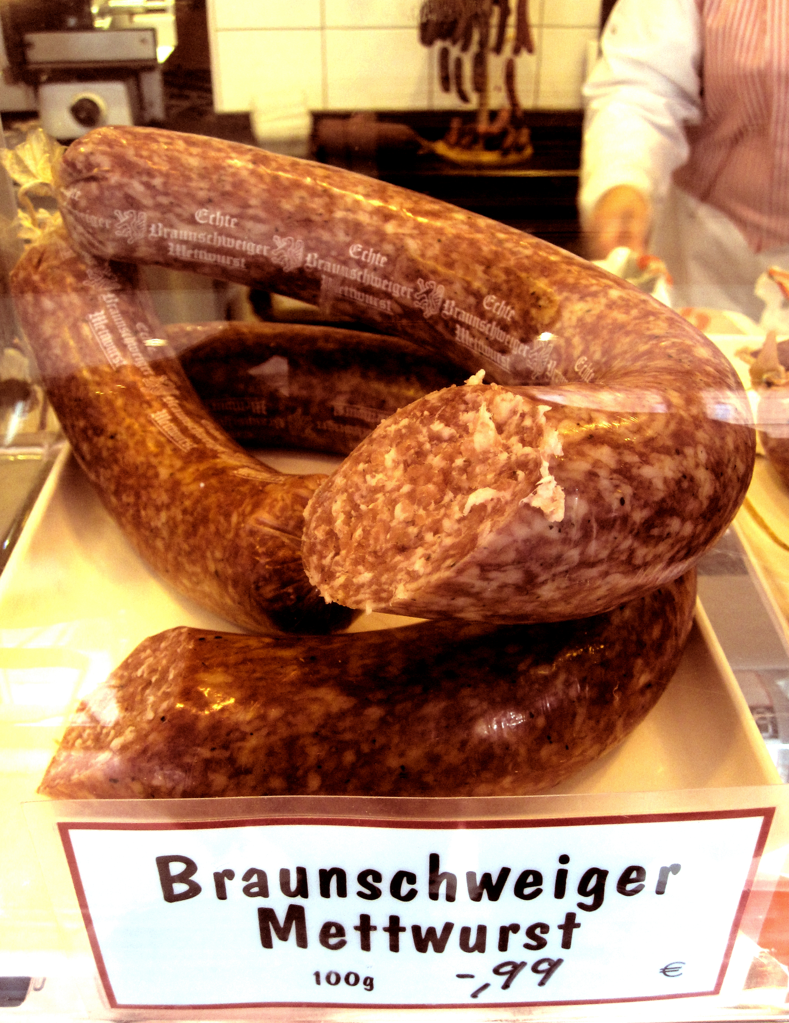 Für Stadt und Region Braunschweig typische Braunschweiger Mettwurst (mit zugehörigem Preisschild) in einer Filiale der Fleischerei Göthe in Braunschweig